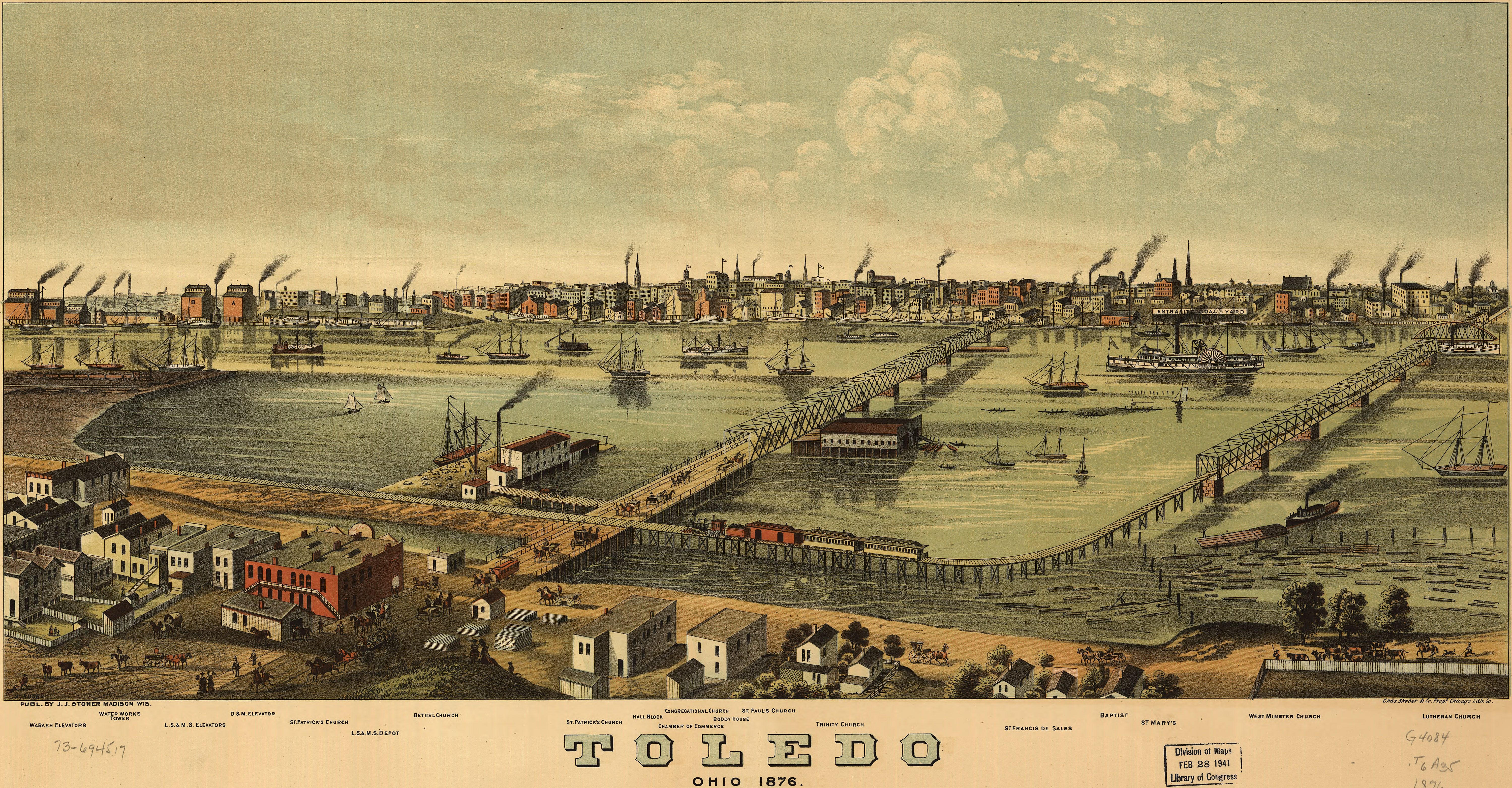 Une vue de Toledo par Albert Ruger en 1876.